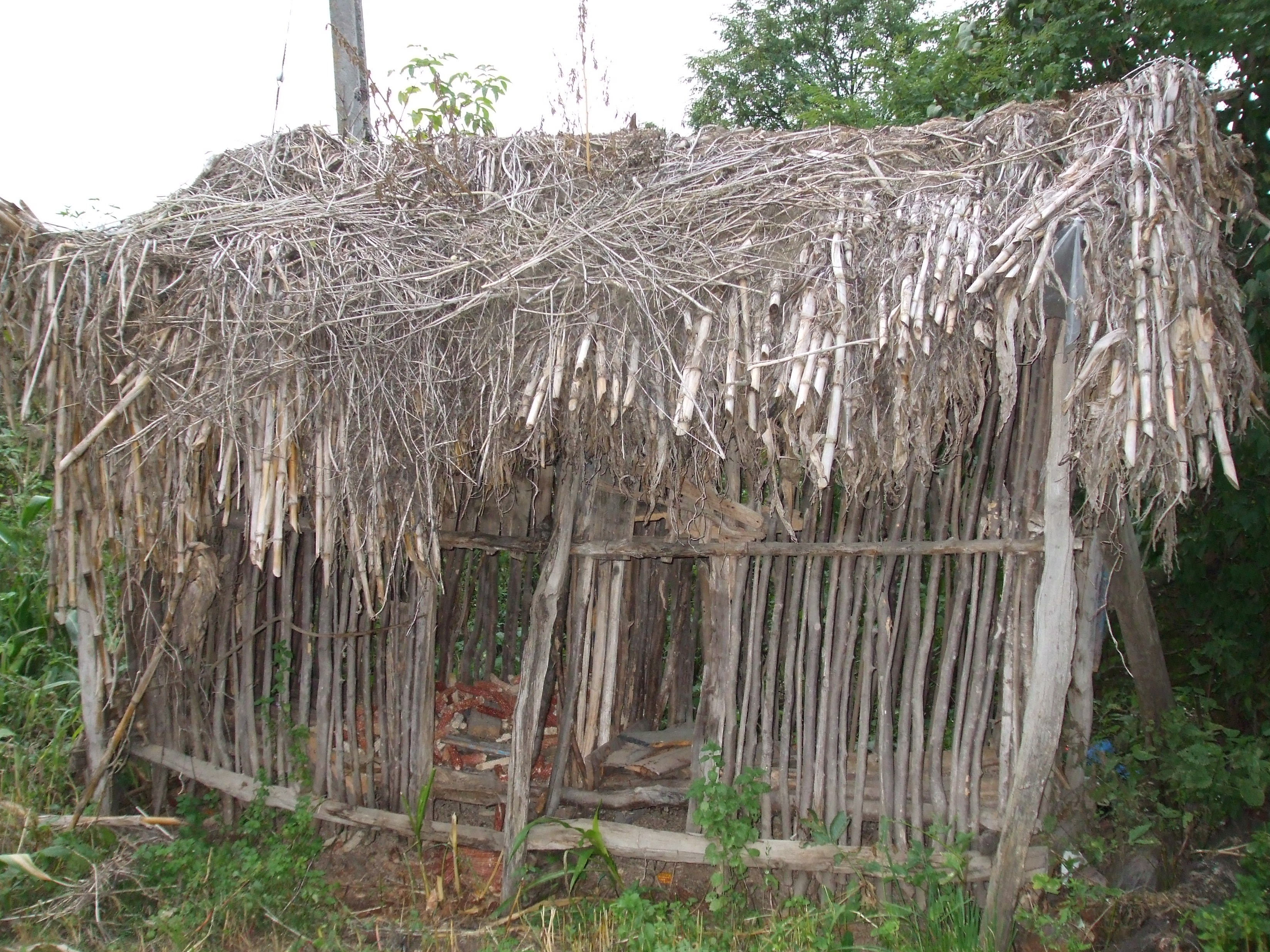 Aruncuta , coștei { pătul } pentru porumb știulete , un model contemporan cu iobagia - păstrat pînă in zilele noastre